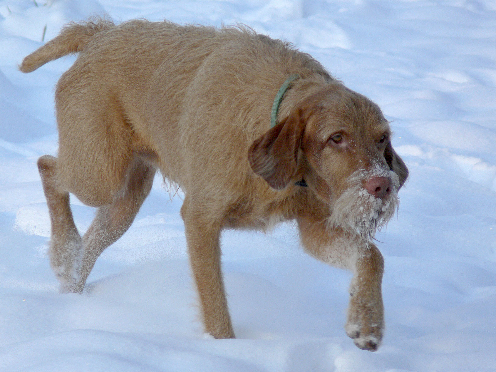 Drahthaarvizsla „Istvan von Haus Schladern“